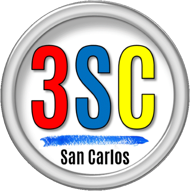 Lo